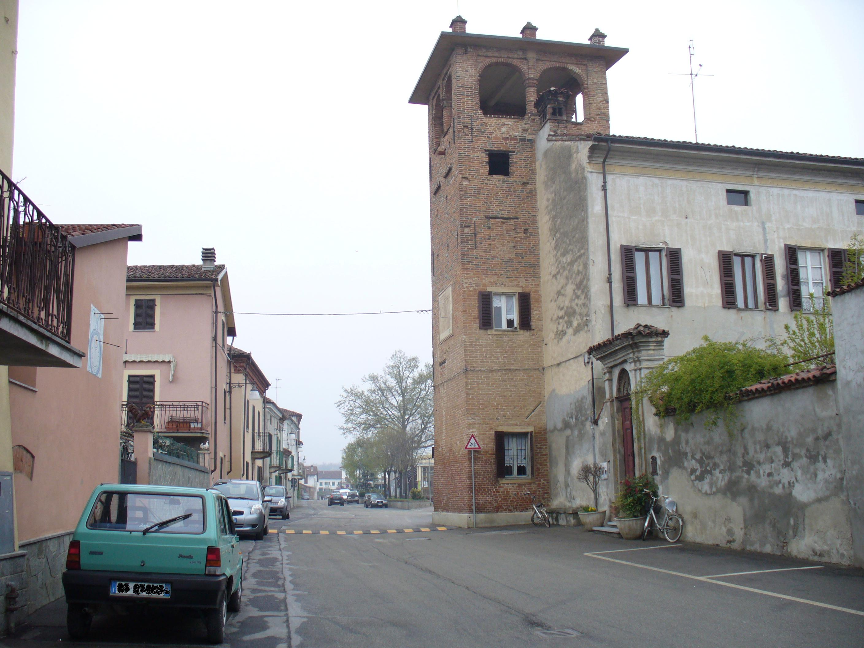 Cerro Tanaro (Asti) I - Torretta, fabbricato risalente al 1600